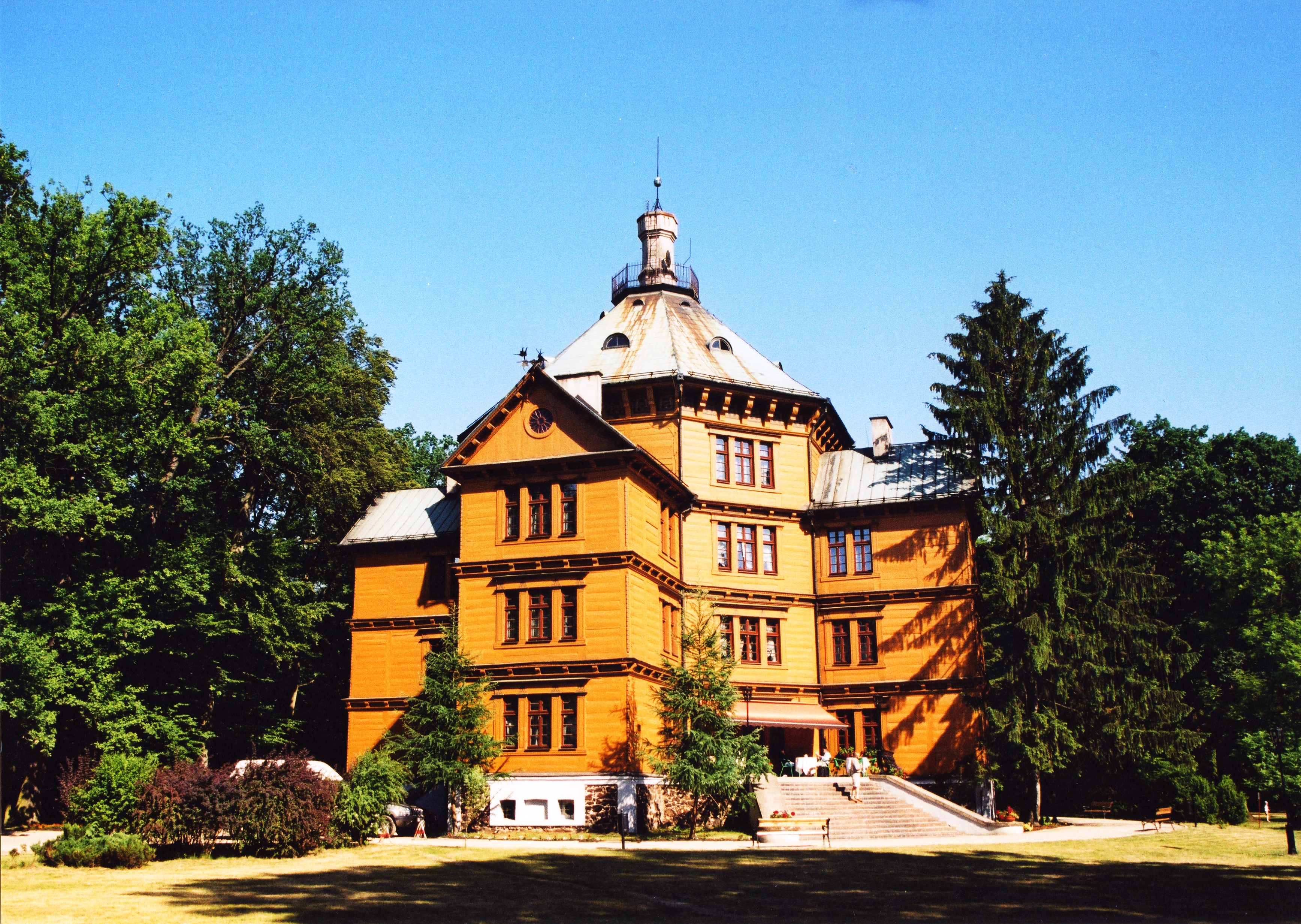 Pałac w Antoninie